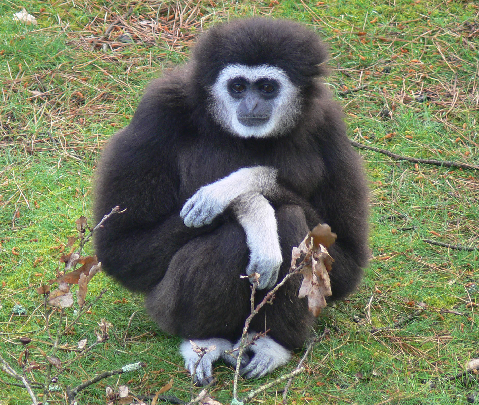 Gibbon à main blanche (Hylobates lar), parc zoologique de Branferé, Bretagne sud (Morbihan).